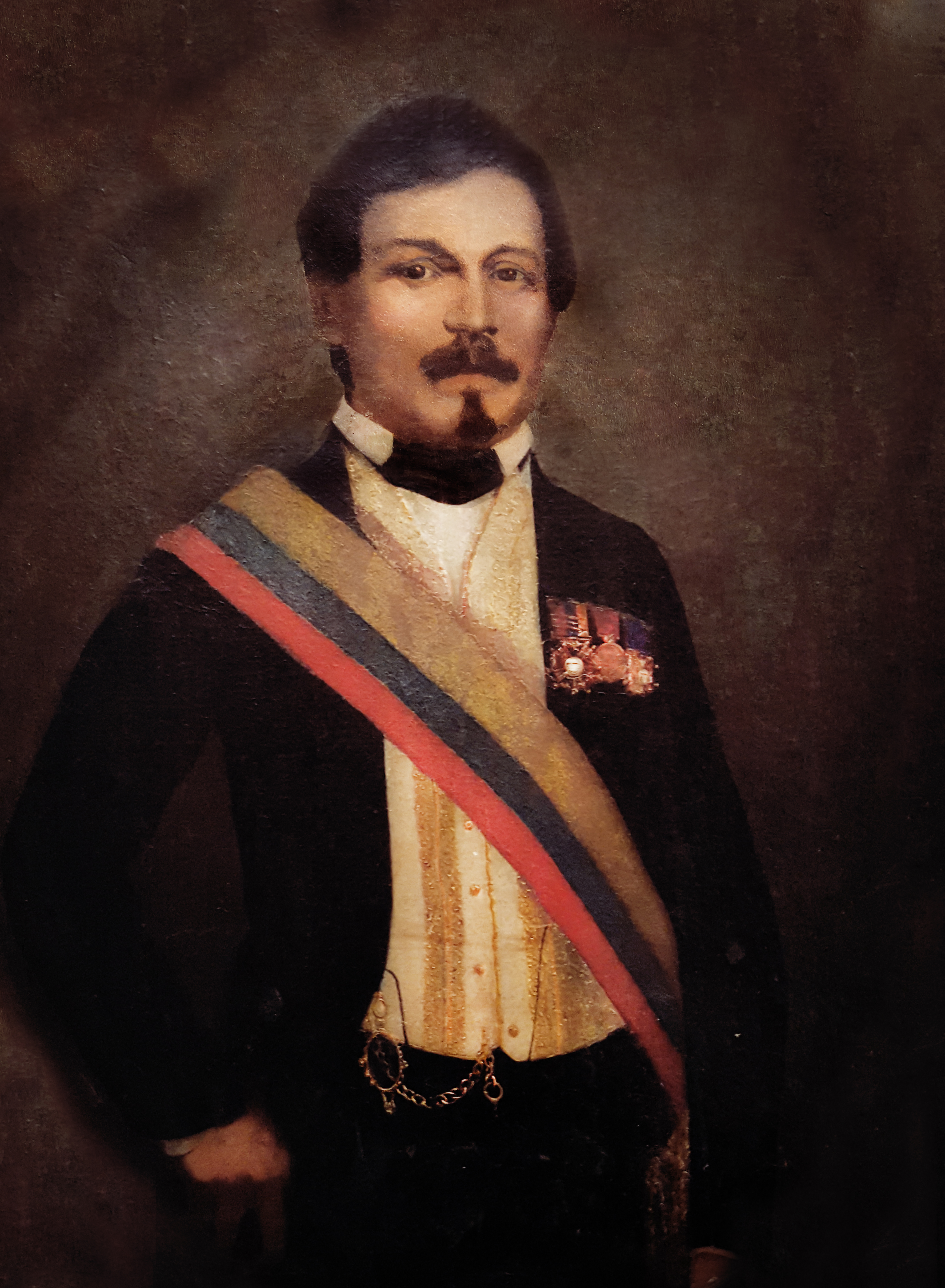 Oleo del Presidente Juan José Nieto Gil